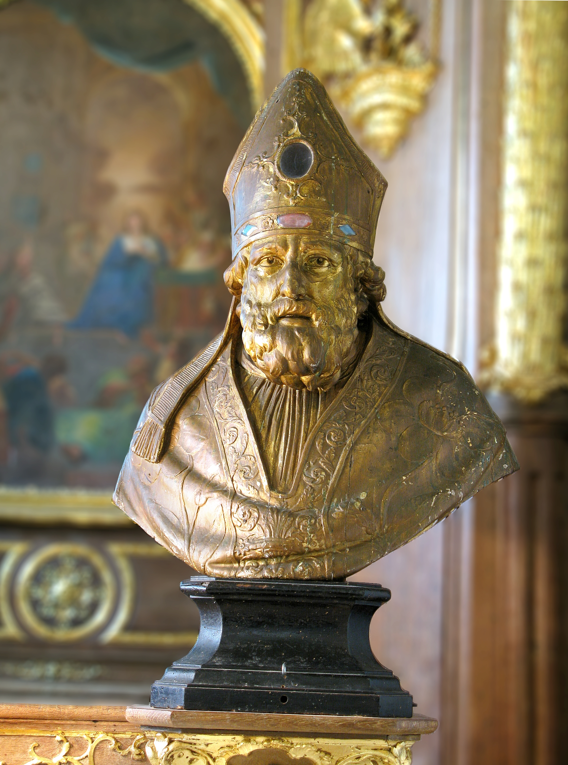 Buste reliquaire de Saint Mauxe. Ce buste se trouve à la droite du maître-autel de l'église d'Acquigny (France - Normandie - Eure)